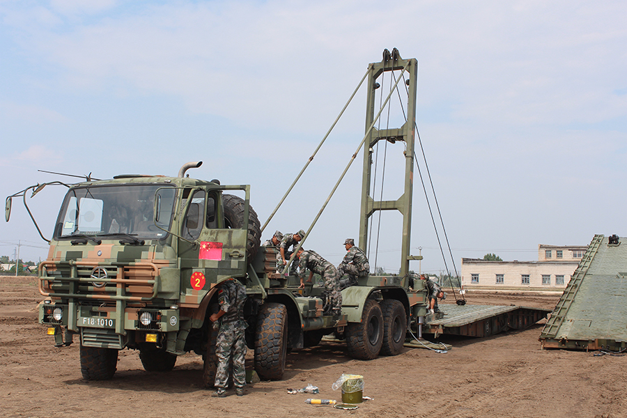 GQL-111 - Демонстрационный и тренировочные заезды команд-участниц конкурсов «Безопасный маршрут» и «Инженерная формула» (г. Волжский, Волгоградская обл.)